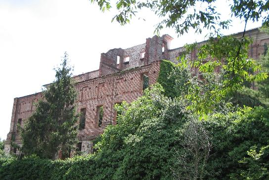 Mura del complesso della Basilica di Superga danneggiate nell'incidente aereo del 1949 conosciuto come tragedia di Superga